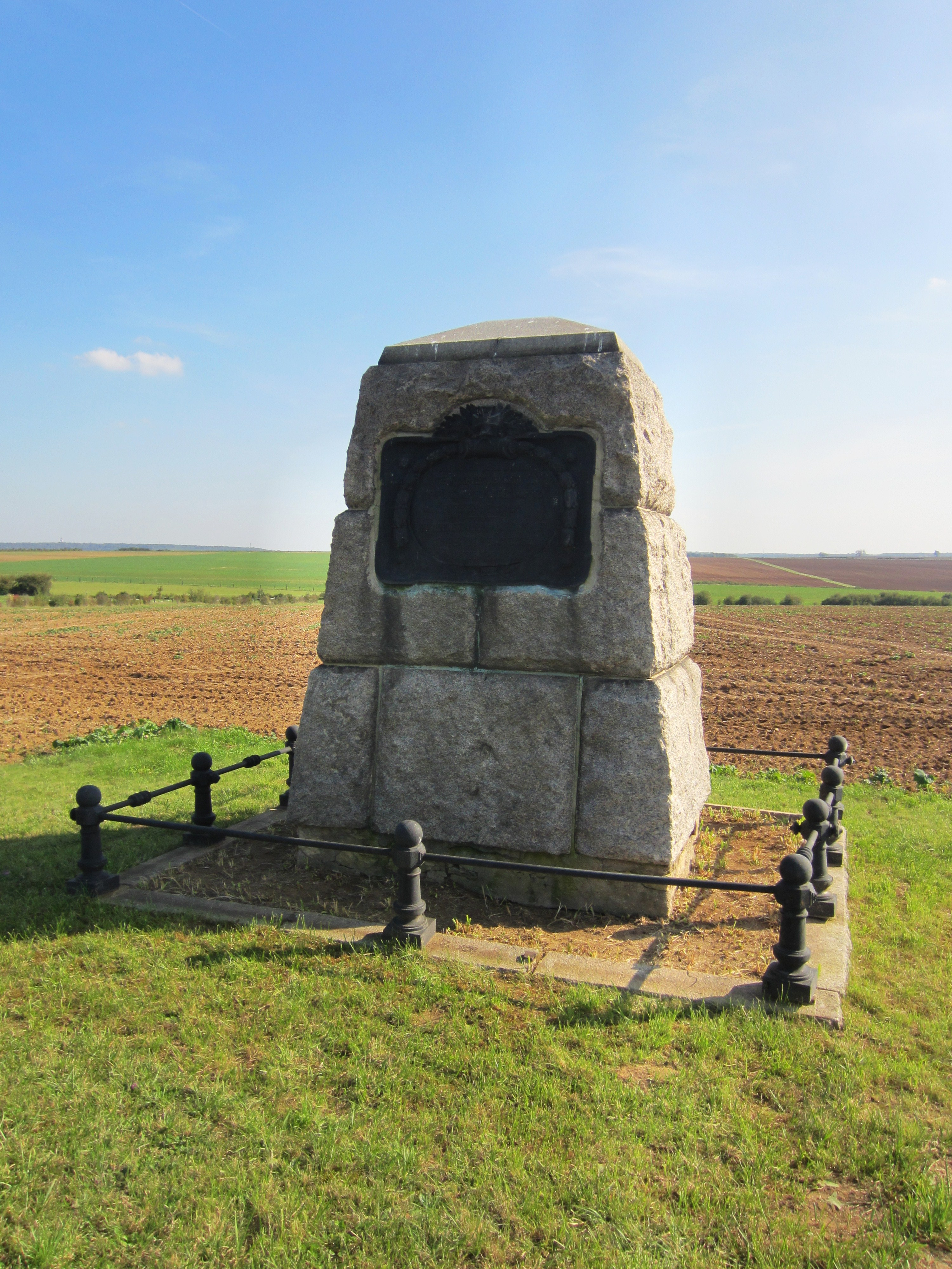 Description Monument commémoratif Rezonville 1 Date25 September 2011Sourcemon appareil photoAuthorAimelaimePermission(Reusing this file) Monument commémoratif Rezonville 1